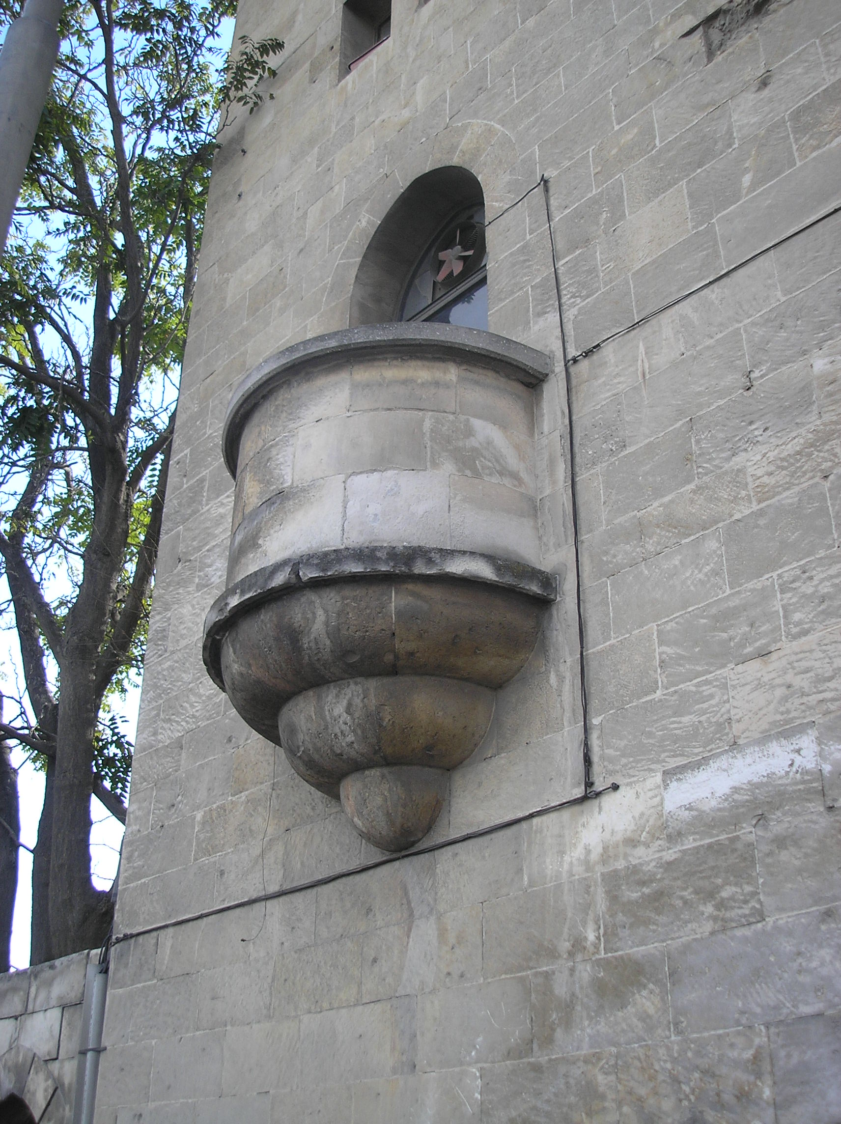 Beit Ot Hamutzar